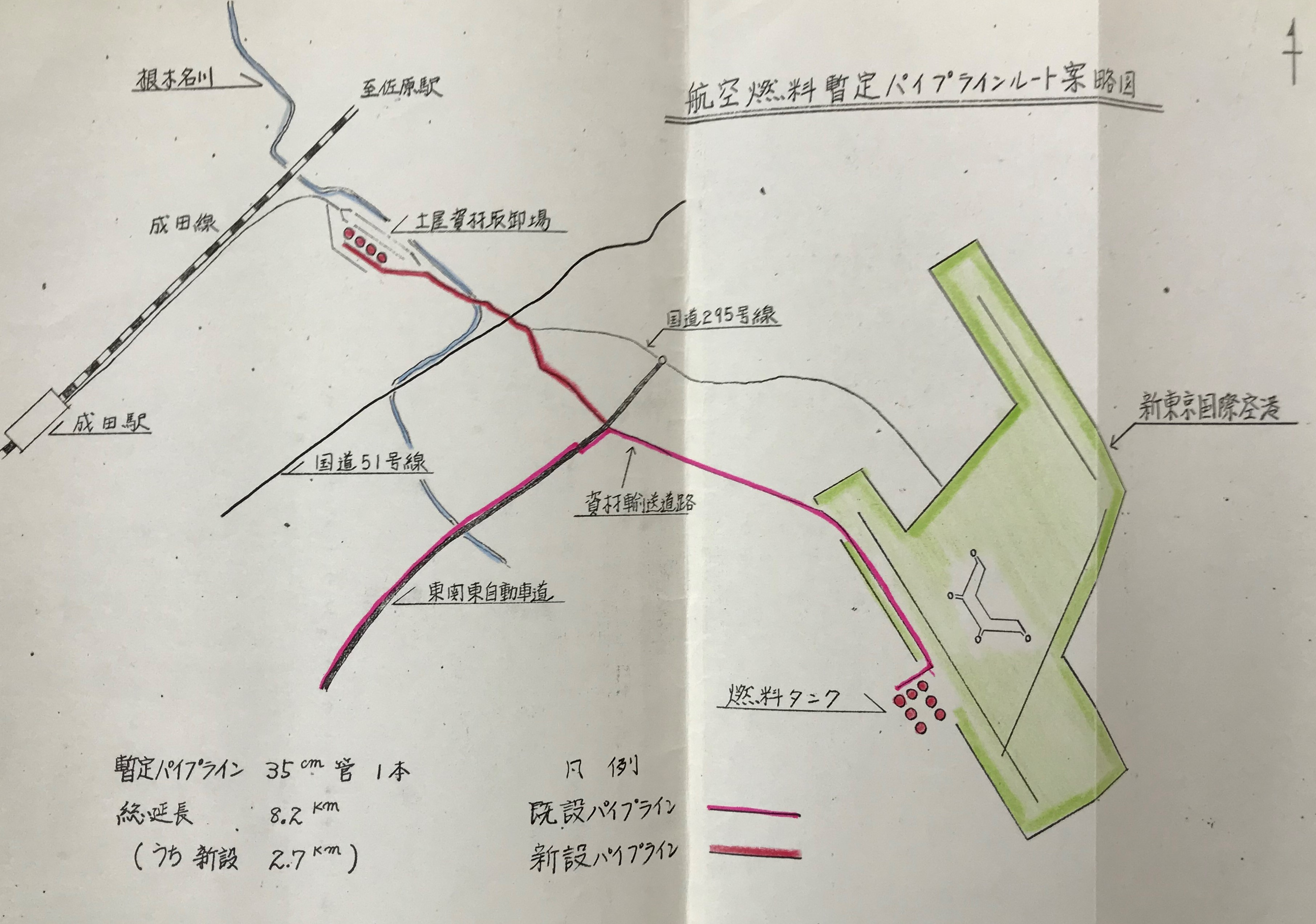 『臨時新東京国際空港閣僚協議会幹事会の開催について』（1973年01月31日）中資料。 国立公文書館にて撮影。